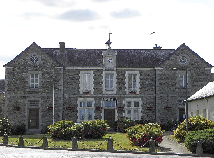 Mairie d'Ercé-près-Liffré (35).